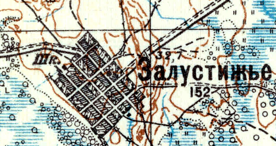 Топографическая карта Ленинградской области, квадрат VIc-27 (Залустижье), деревня Залустежье